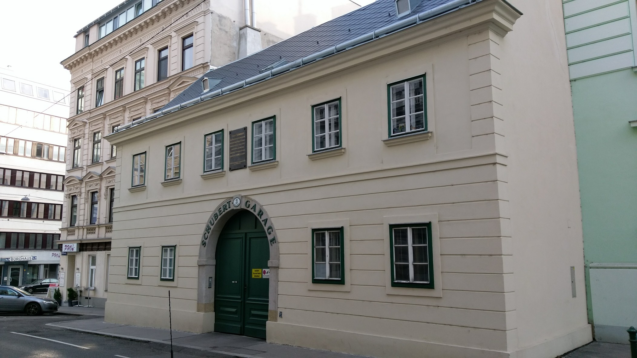 Schubert Saeulengasse 3